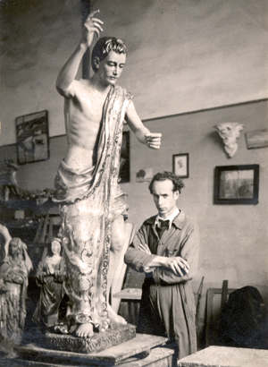 León Ortega con su Angel de Huelva recién terminado en su taller de San Cristobal.